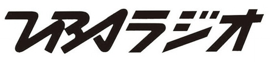 TBSラジオ 筆記体ロゴ時代のロゴ